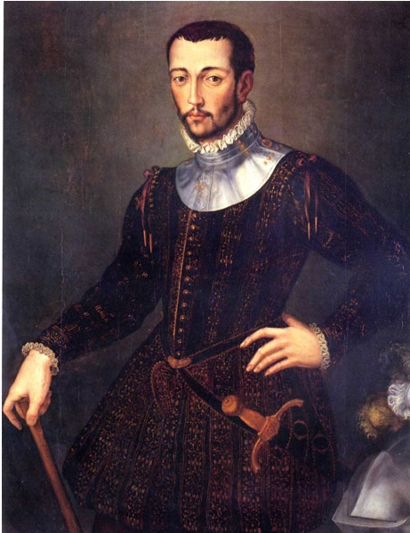 Ritratto di Francesco I de' Medici (1541-1587)